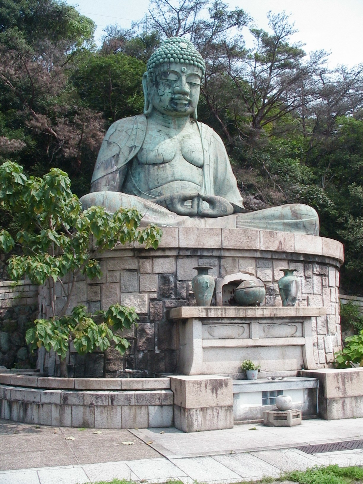 鵯越墓園大仏